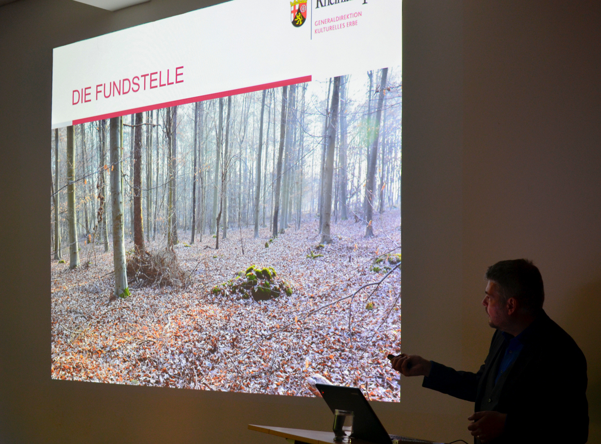 Vortrag zum Hortfund von Rülzheim durch Ulrich Himmelmann, Generaldirektion Kulturelles Erbe Rheinland-Pfalz, Landesarchäologie, im Niedersächsischen Landesamt für Denkmalpflege